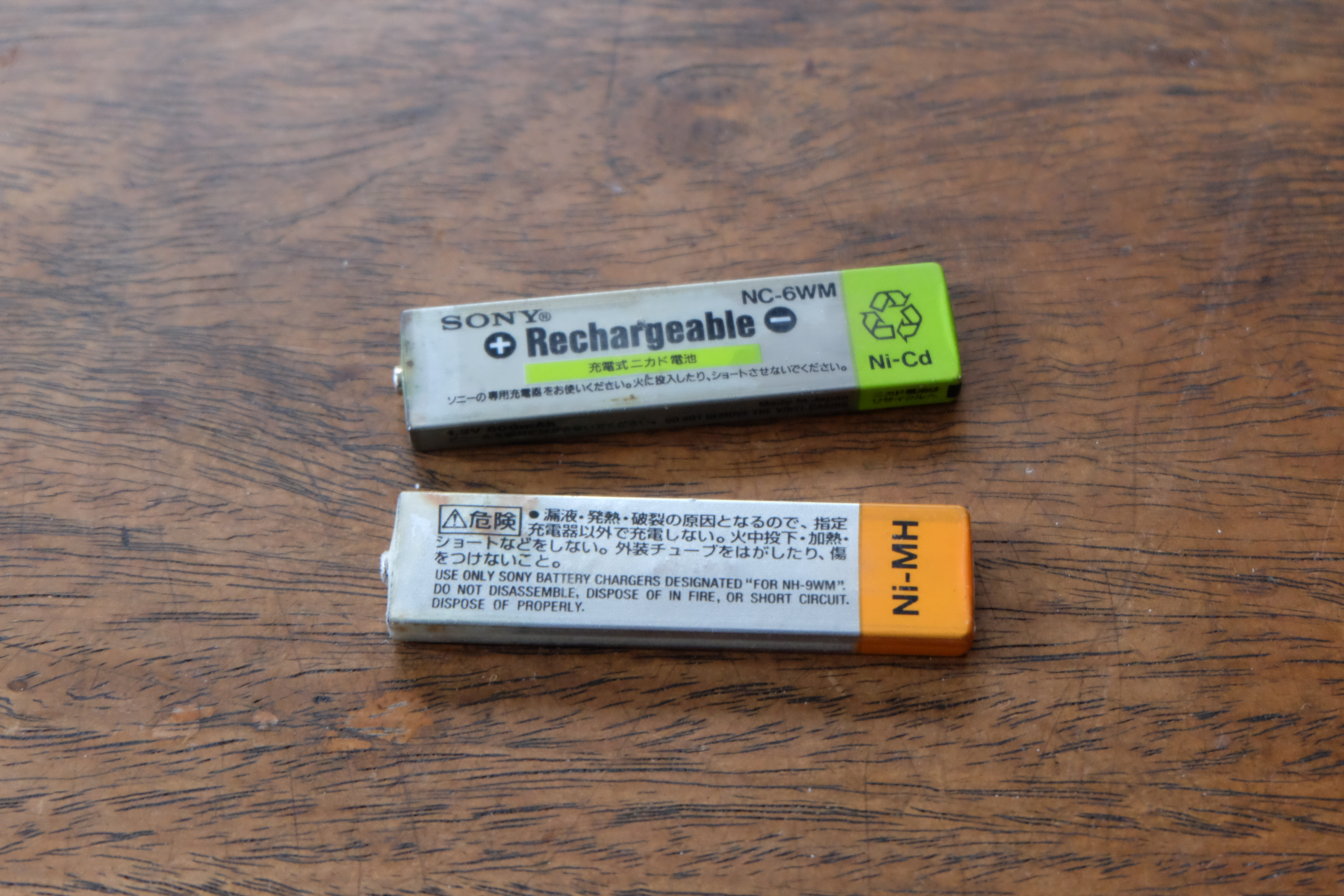 ガム形電池